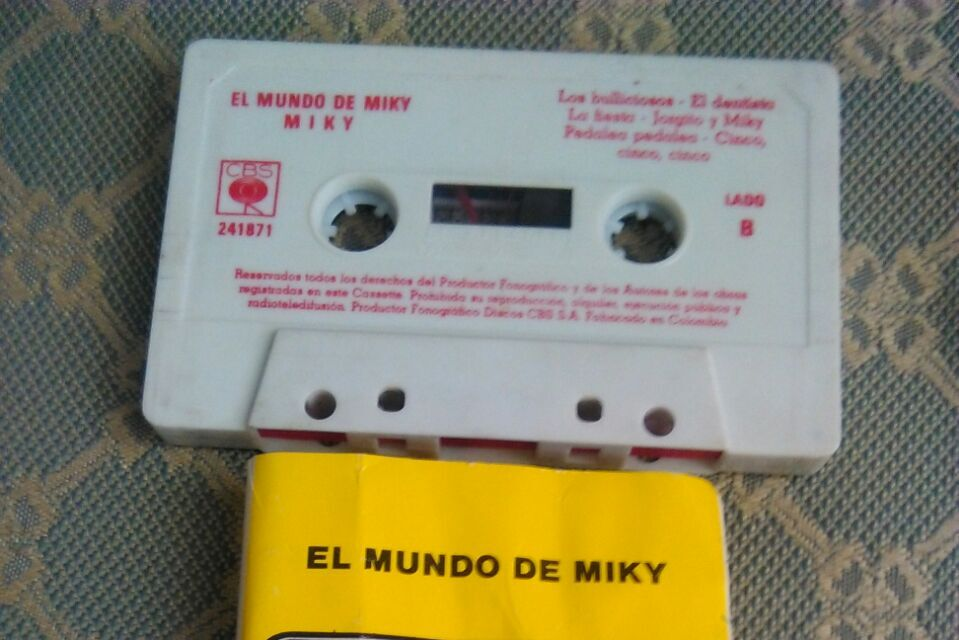 Casete de el mundo de Miky, el payaso, para niños